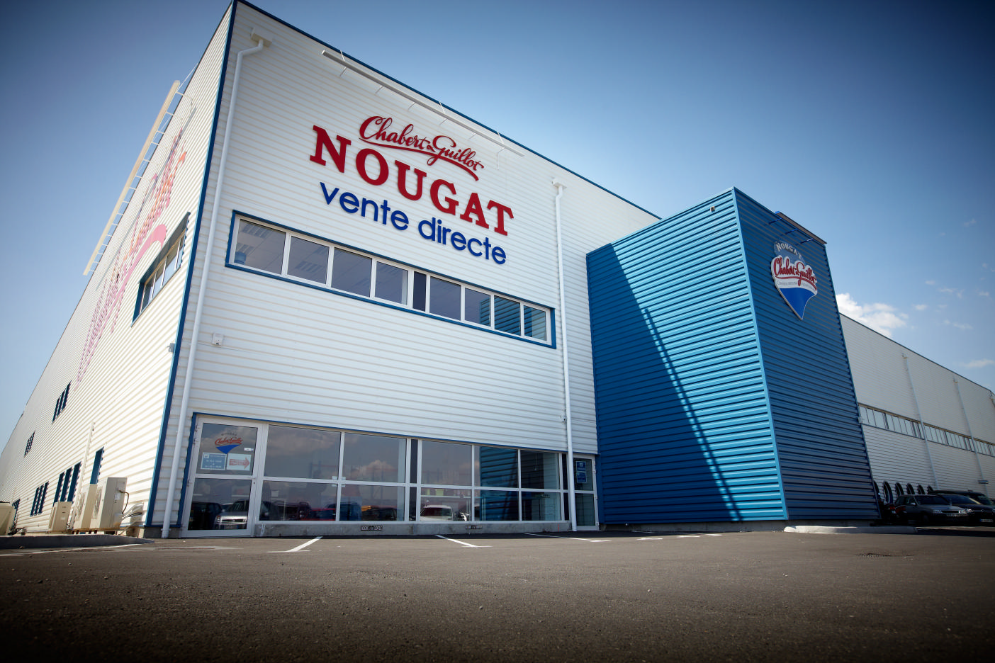 Entrée de l'unité de fabrication de Chabert et Guillot, confiseur nougatier depuis 1848 à Montélimar, Drôme, France.